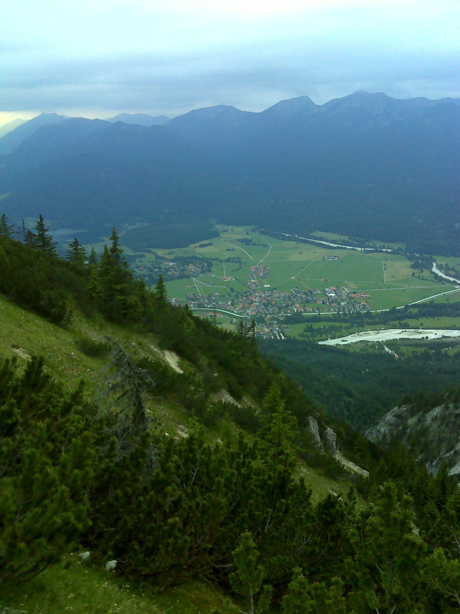 Krün von unterhalb des Seinskopfs aus gesehen